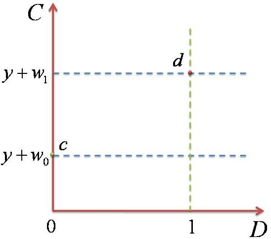 Relación entre las amenidades y el nivel de consumo.